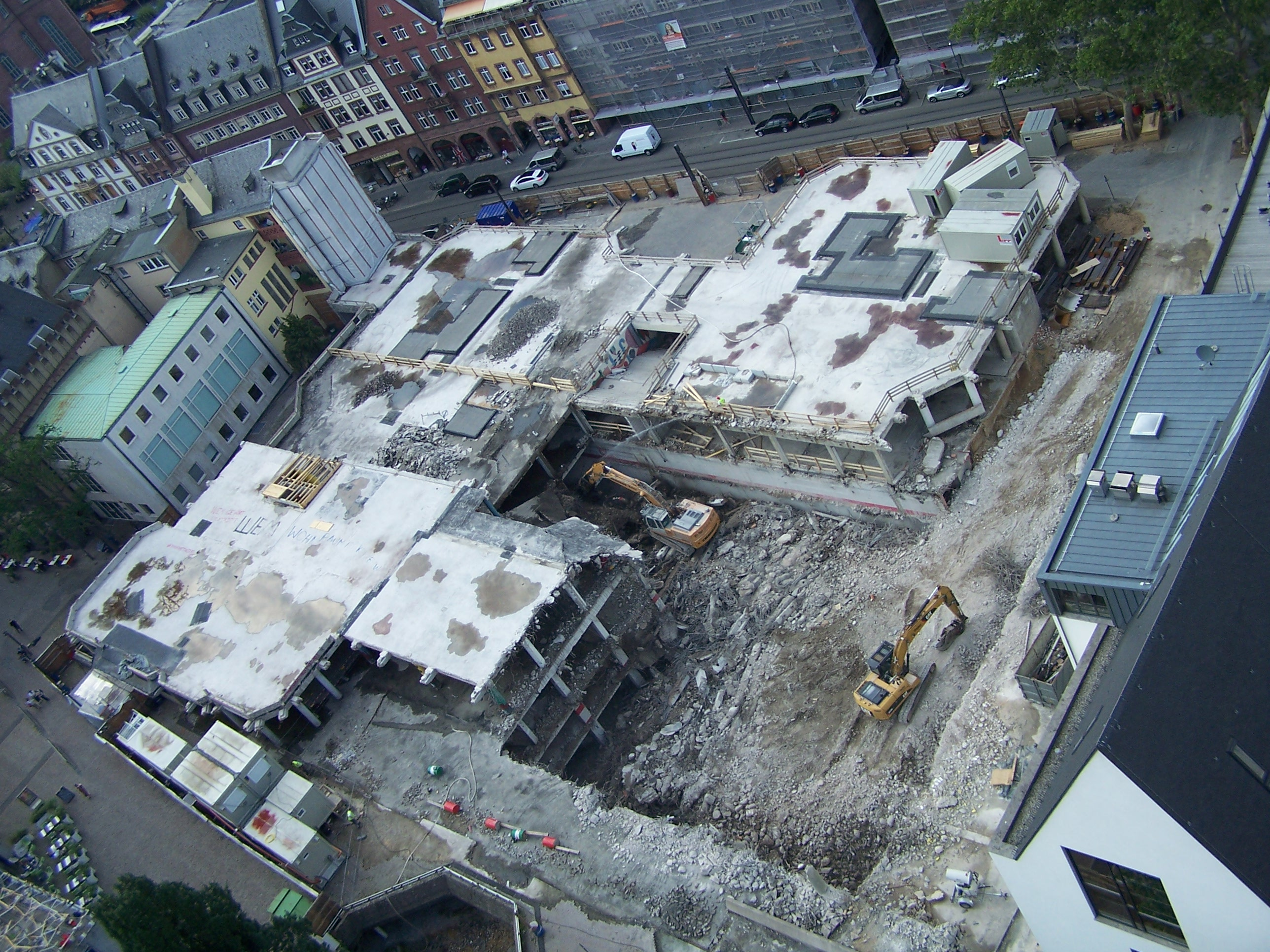 Abriss des Technischen Rathauses in Frankfurt am Main, Dom-Römer-Areal